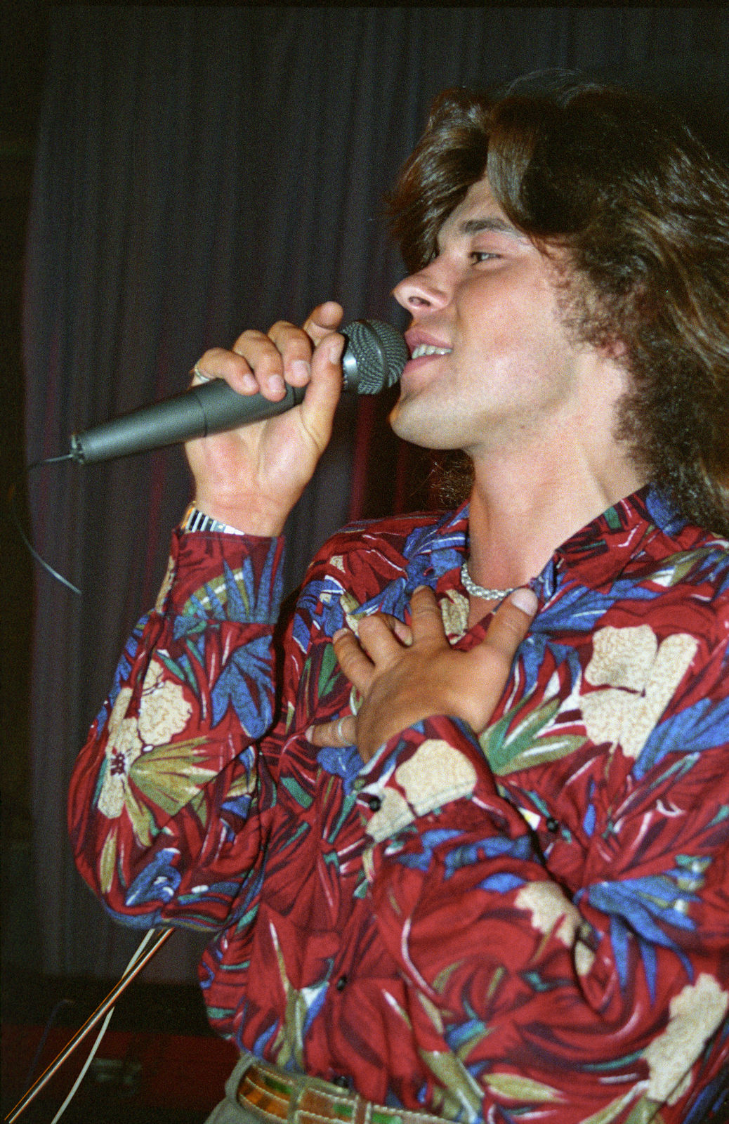 Евгений Белоусов выступает на концерте в культурном центре «Славич» в день 60-летия ОАО «Компания Славич».